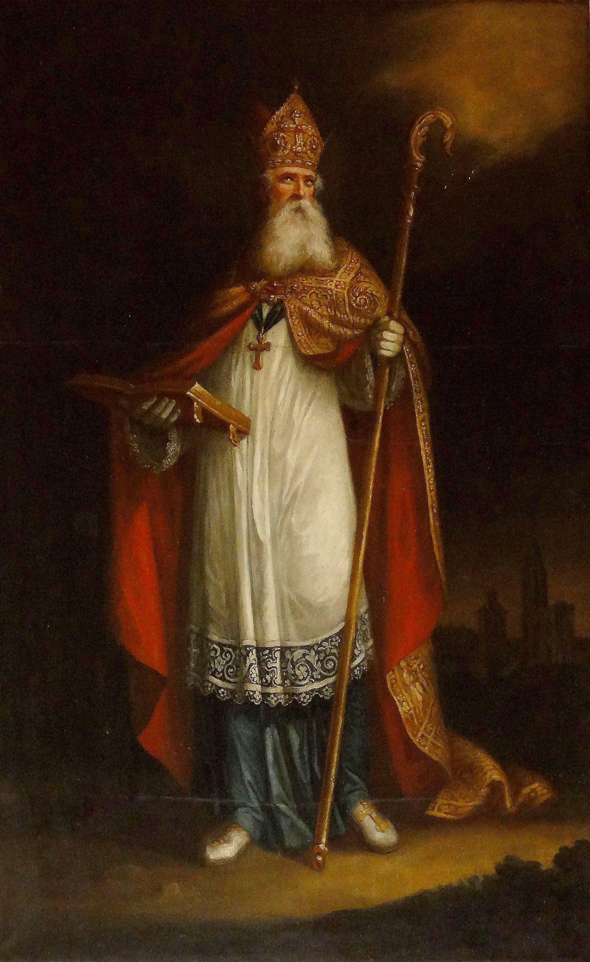 Alsace, Bas-Rhin, Rohr, Église Saint-Arbogast (IA67000965). Tableau "Saint Arbogast" (Michel OSTER, huile sur toile, 220cm de large, 1831)